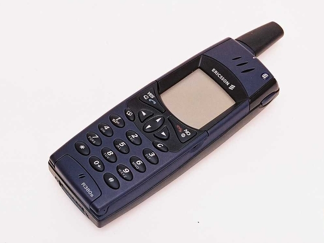 Det finnes brosjyrer på denne telefonen fra okt 2000. Telefone kostet da kr. 6.500,- Den har dual band for 900/1800 Denne er produsert i uke 39 2000 Telefonen er en gave fra Ericsson i Asker til Norsk Telemuseum i 2002